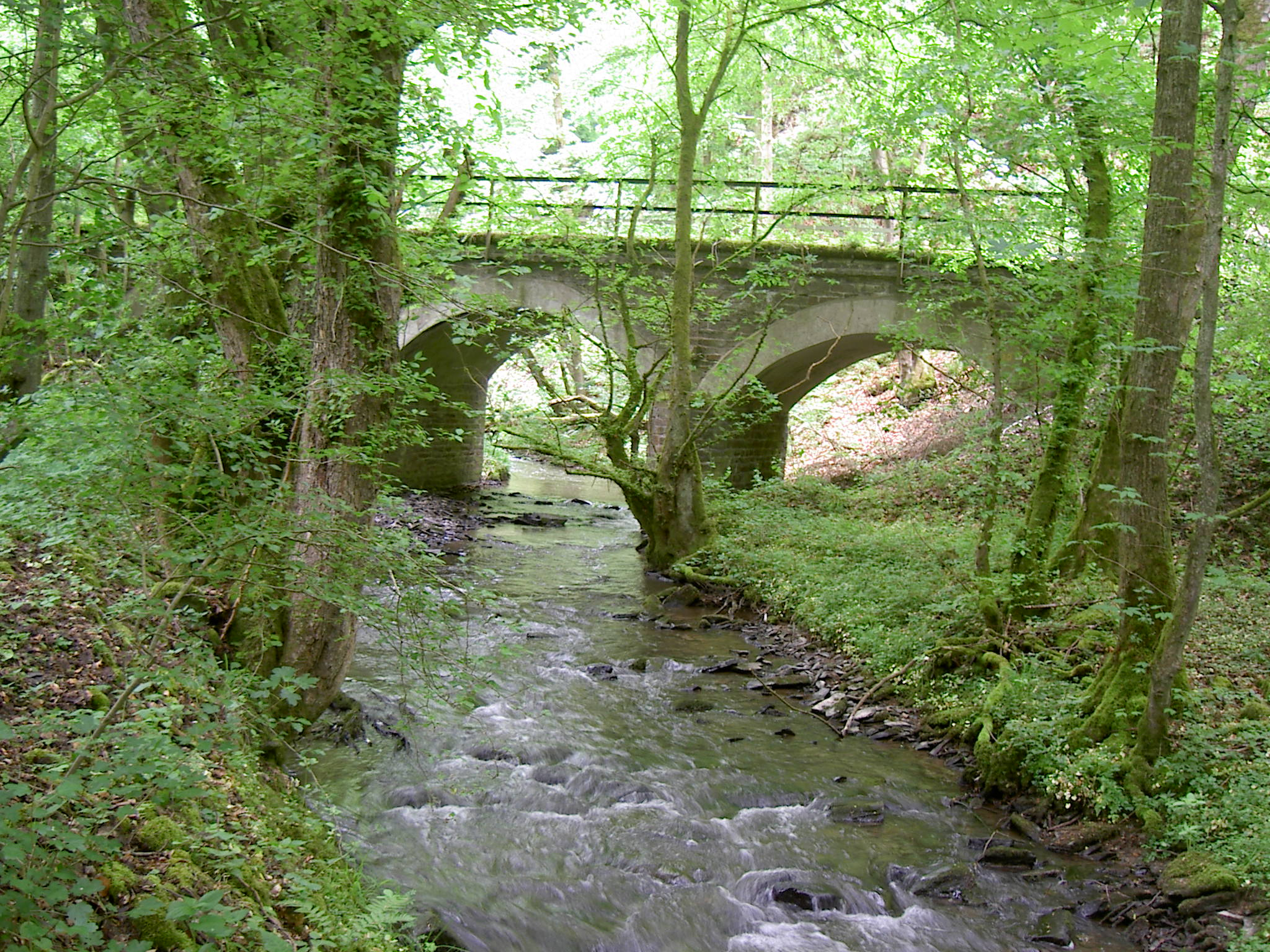 Der Brexbach im Bereich zwischen Grenzau und Bendorf-Sayn / Pfadfinderlager